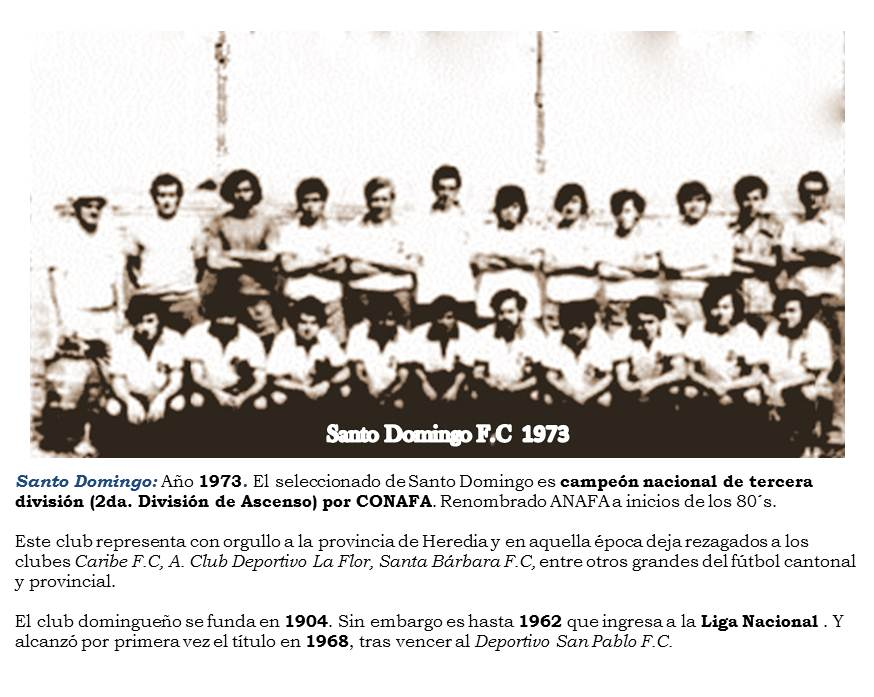 Santo Domingo tuvo como antecedentes a la A.D. Domingueña (anteriormente Club Sport Domingueño, equipo que militaba en los torneos cantonales en 1904). Los ciudadanos domingueños se interesaron por constituir un equipo que representara a Santo Domingo y que compitiera en la terceras y segundas divisiones de ascenso. El 20 de septiembre de 1904 se funda el Club Sport Domingueño, constituyendose la primera Junta Directiva integrada por su presidente don Eulogio Aguilar B. Para la década de los 50`s se utiliza de base al Atlético Santa Rosa F.C y Deportivo Danubio F.C, para competir en los torneos de canchas abiertas e interdistritales por Heredia.